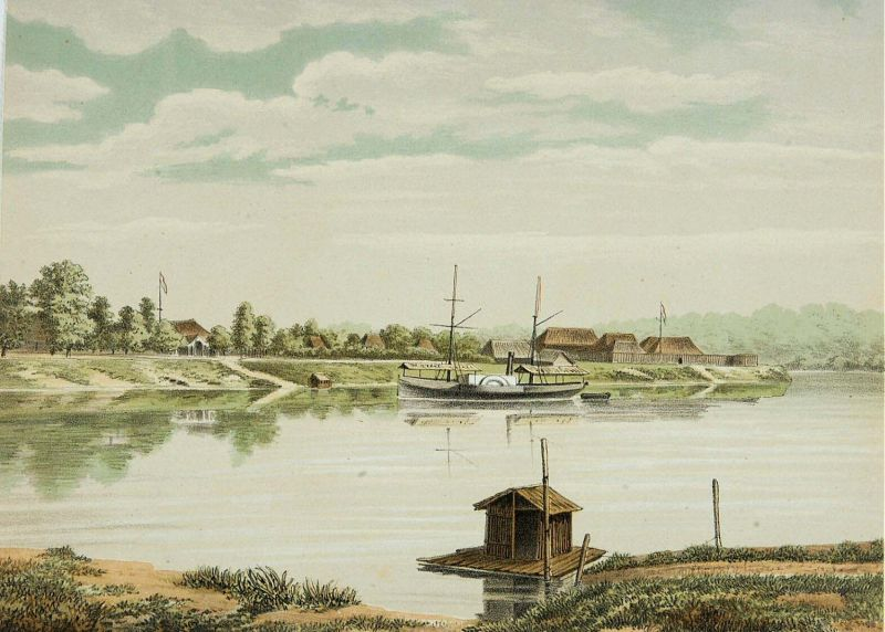 Litho. Litho naar een oorspronkelijke aquarel van Rappard. Sintang